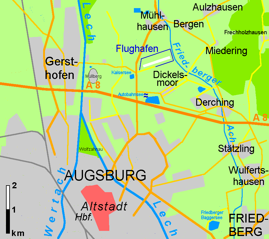 Der Nordosten von Augsburg: Ortschaften: Gersthofen, Mühlhausen, Bergen, Aulzhausen, Miedering, Frechholzhausen, Derching, Stätzling, Wulfertshausen, Friedberg, Dickelsmoor, Lech, Wertach,Friedberger Ach, Autobahnsee, Kaisersee, Wolfzahnau, Flughafen Augsburg, Augsburger Müllberg